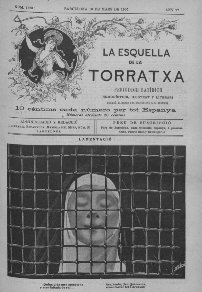 Portada de la revista La Esquella de la Torratxa